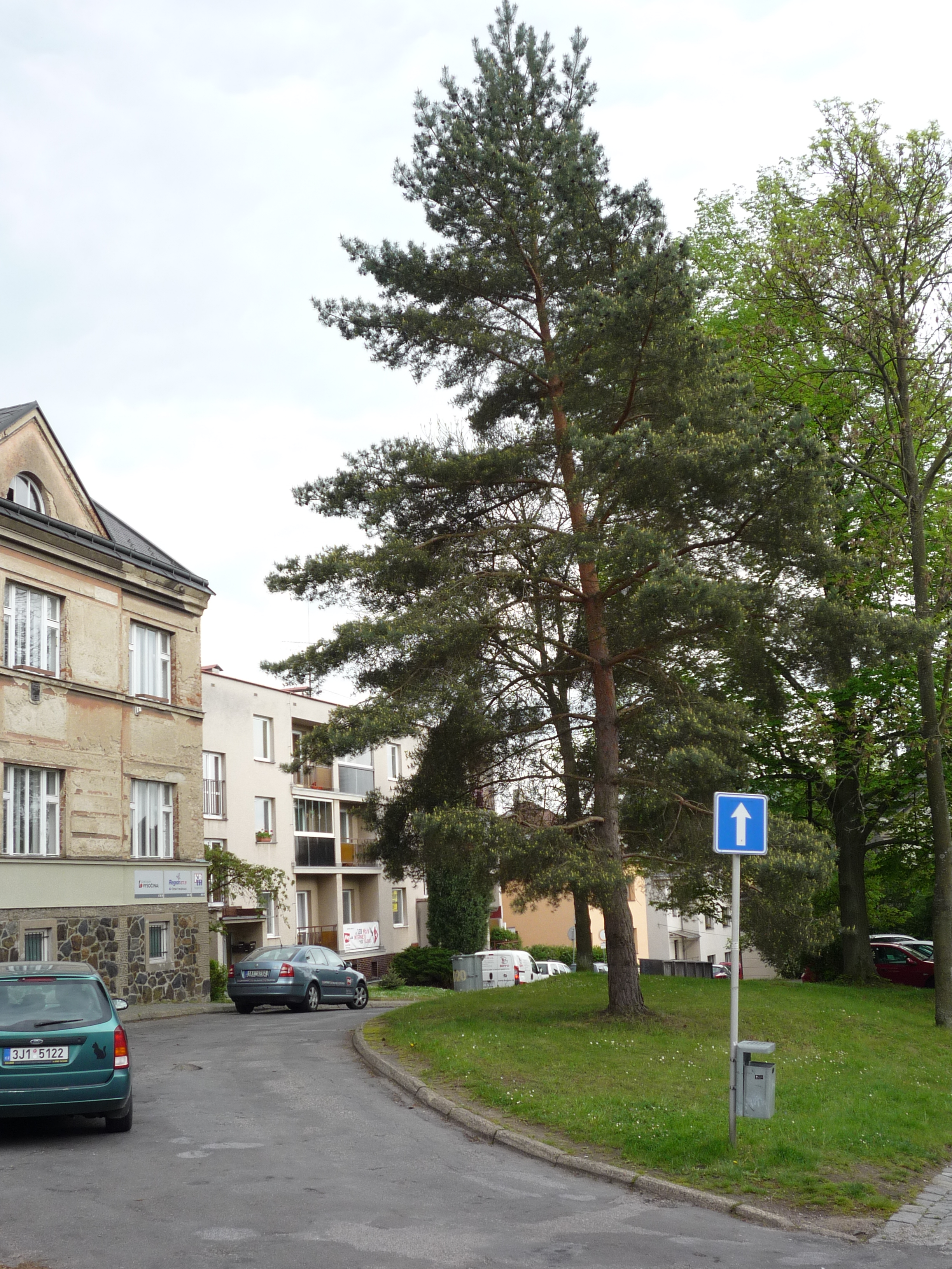 Autor fotografie Jiří Zelenka. Toulky Vysočinou. Ulice B. Kobzinové. Havlíčkův Brod. Kraj Vysočina.